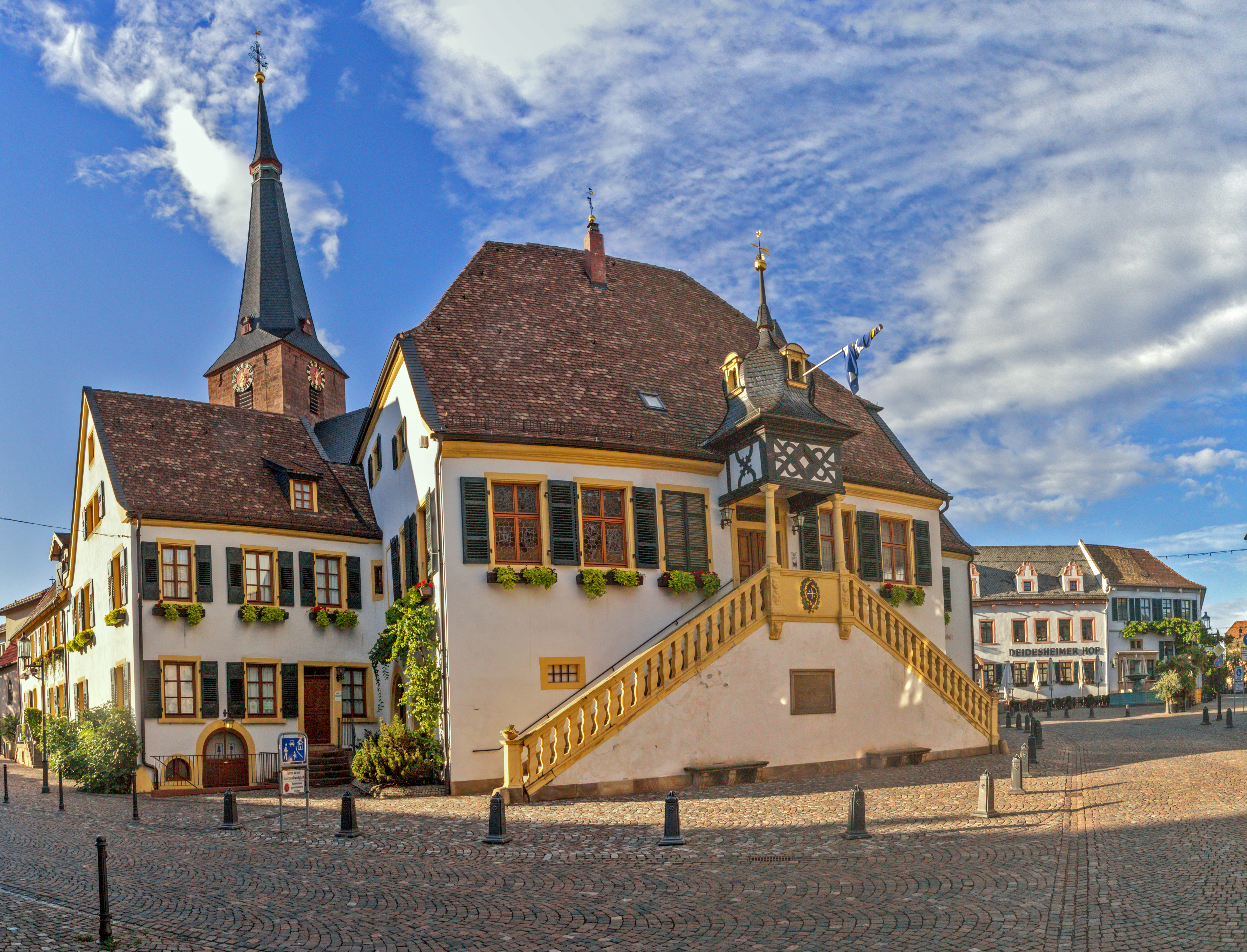 Deidesheim